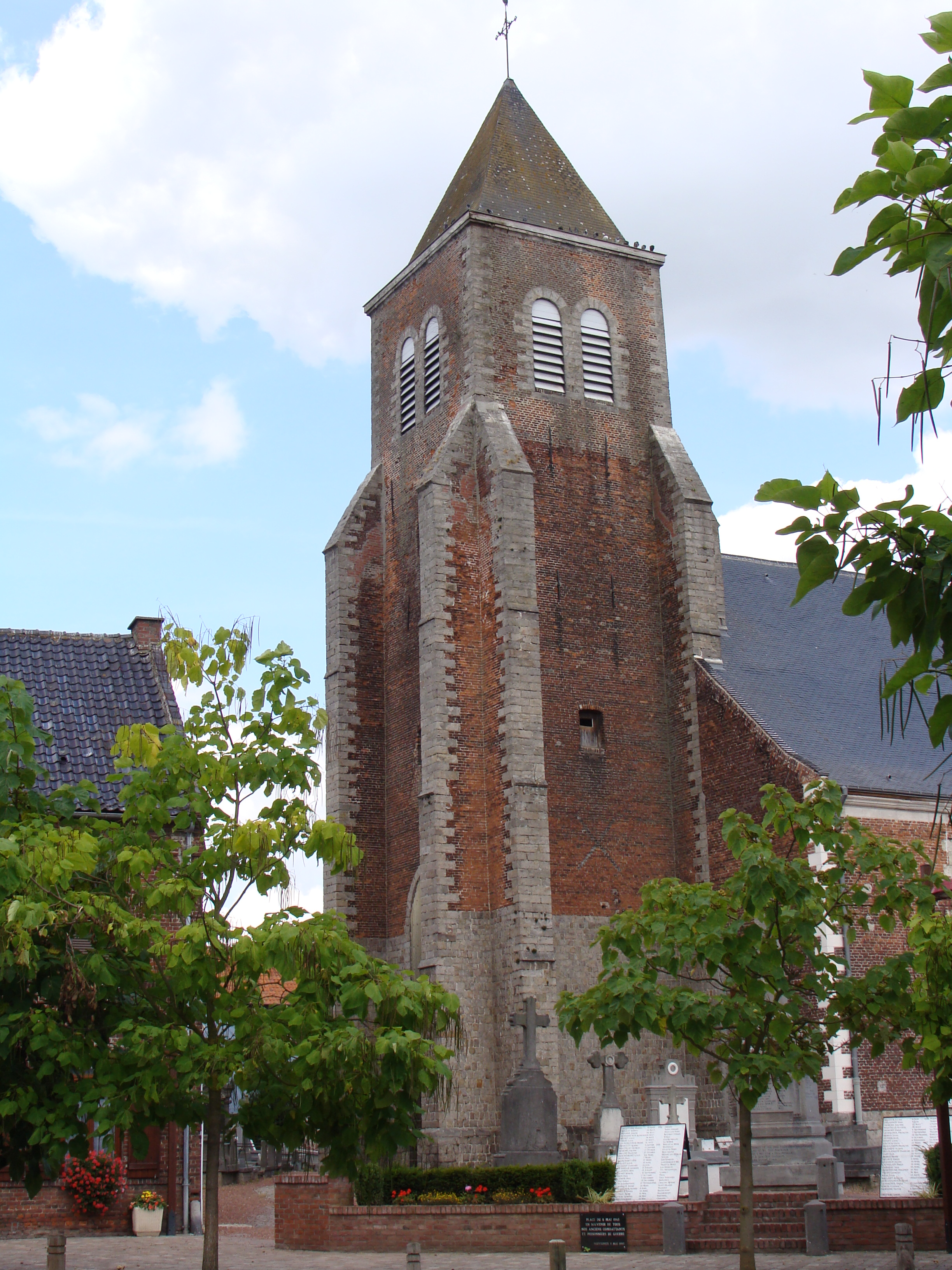 L'église de Bouvignies département du Nord France